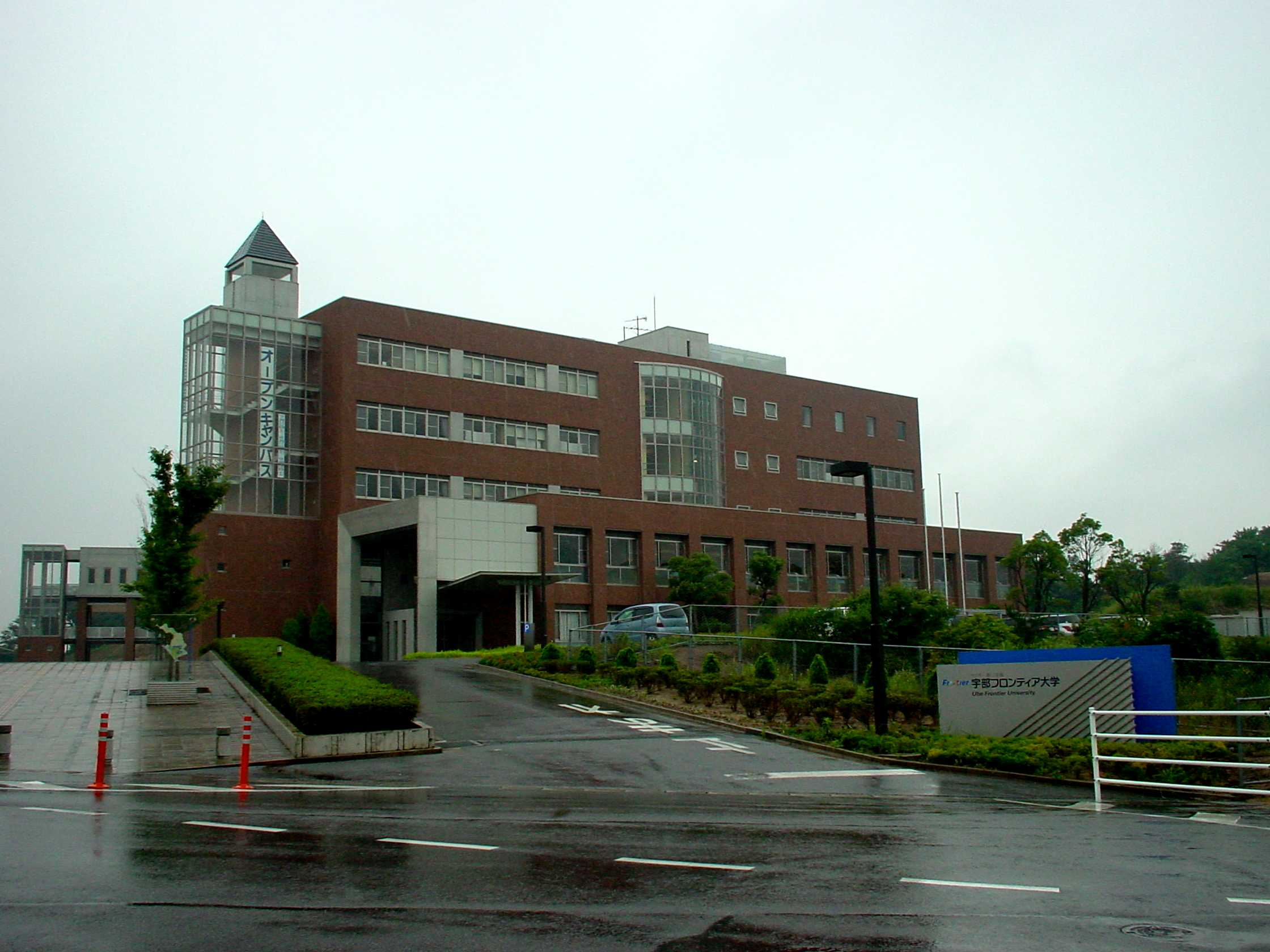 宇部フロンティア大学, 2006年7月9日撮影